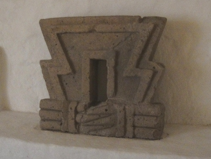 Template:Plazuelas structure ornment